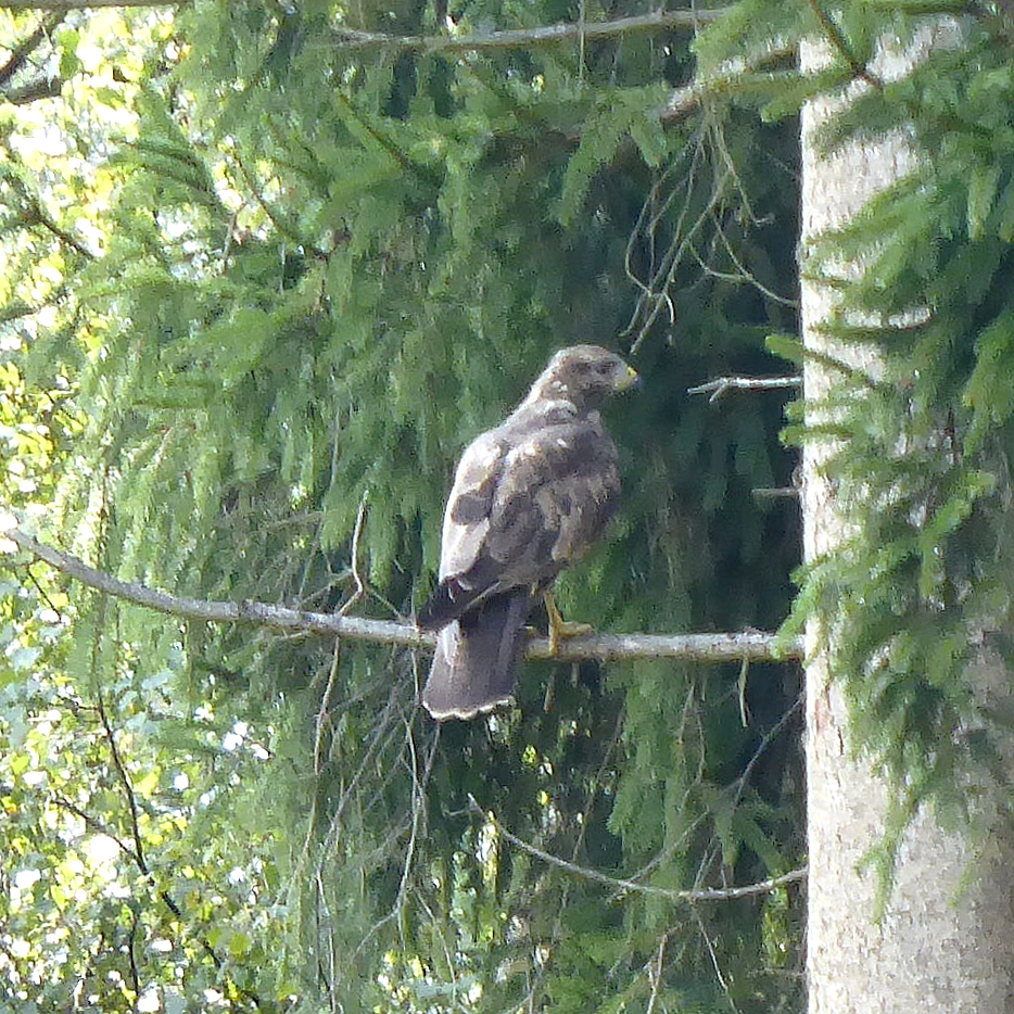 Greifvogel im Lohholz in Mindelaltheim